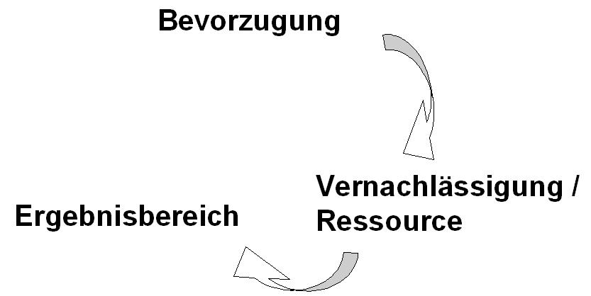 Grundlegende Triade des psychographischen Modells